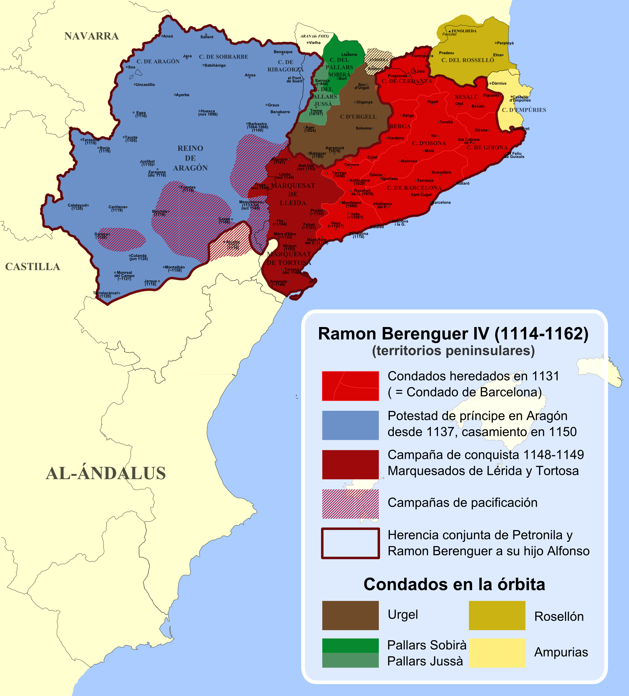 Mapa del territorio peninsular de Ramon Berenguer IV y condados en su órbita. Rasterización de Image:Territorio Ramon Berenguer IV-es.svg